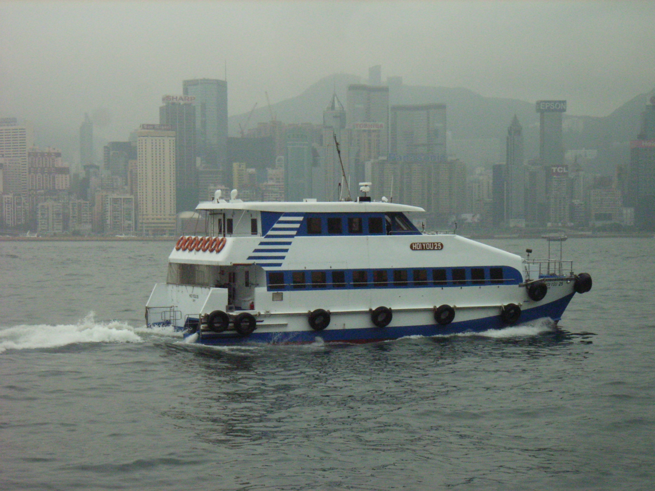 尖東碼頭 是位於zh:香港zh:尖沙咀東zh:梳士巴利道海旁的zh:躉船zh:碼頭。 Hoi You Ferry 經營航線: 海祐小輪往zh:中環8號碼頭zh:飛翔船航線，單程$4.5，班次約20分鐘一班